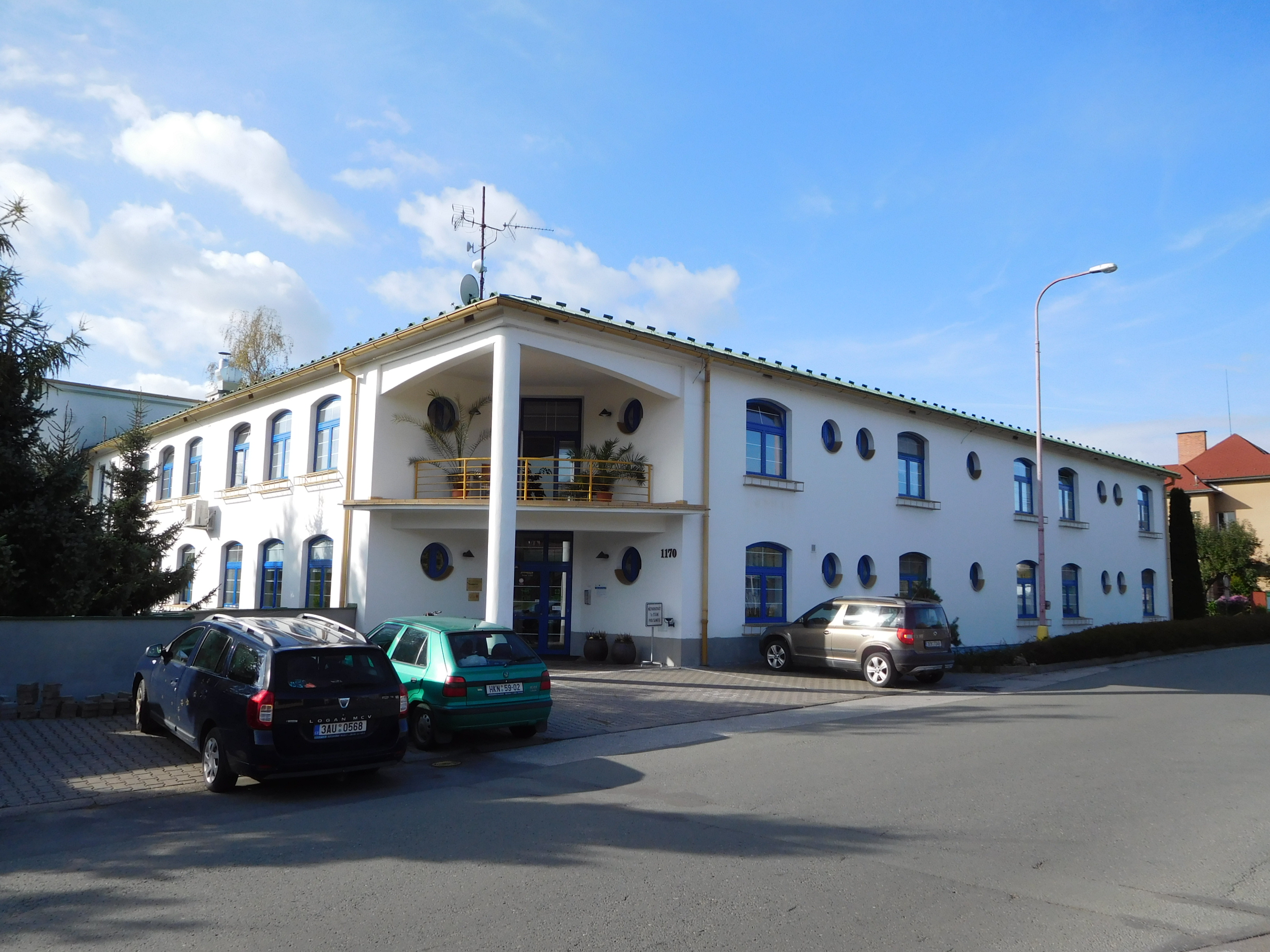 Hospic Anežky České, 5. května 1170, Červený Kostelec